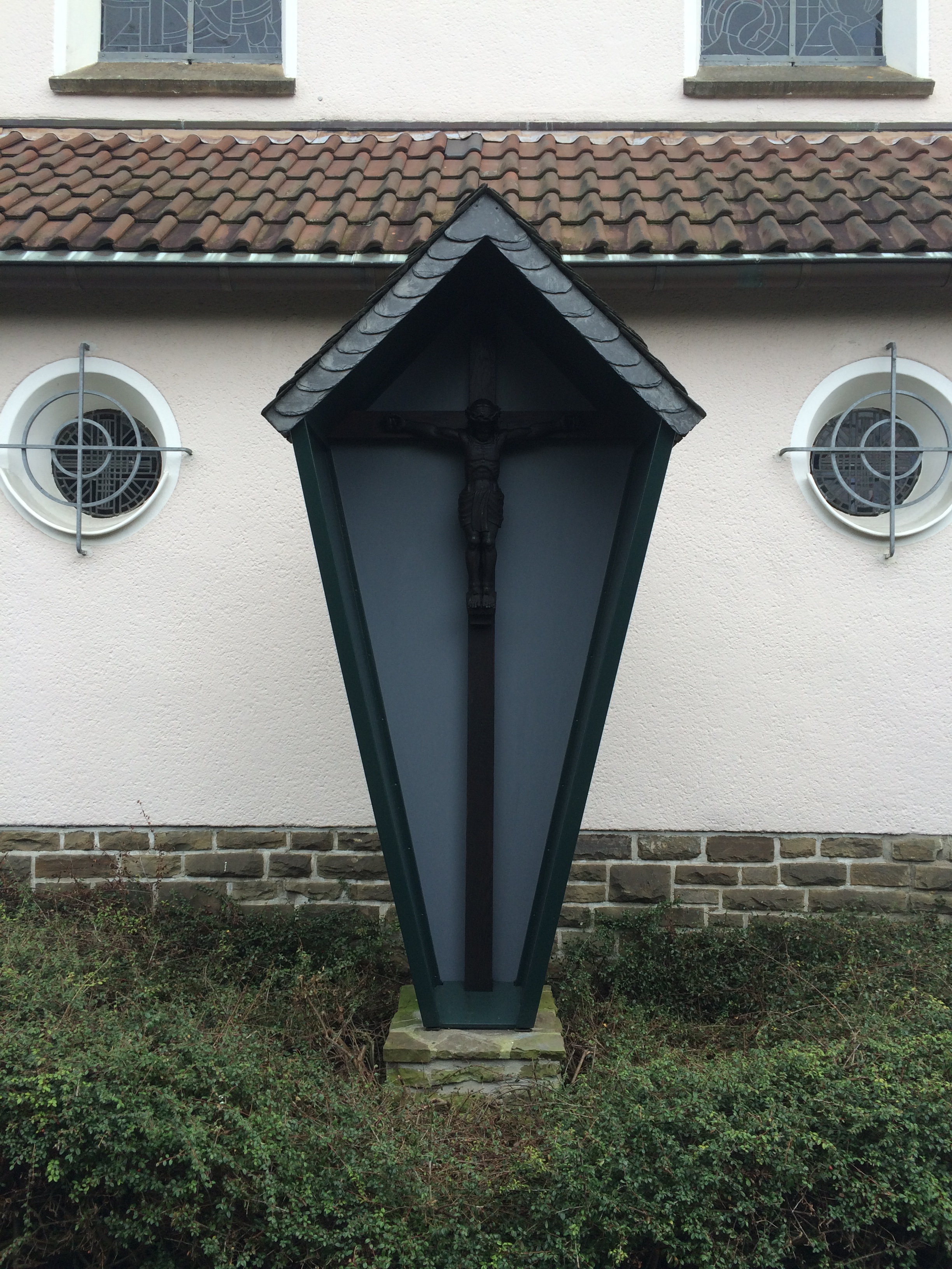 Pfarrkirche St. Mariä Heimsuchung in Sankt Augustin-Mülldorf, eine von acht Kirchen des katholischen Seelsorgebereichs Sankt Augustin.